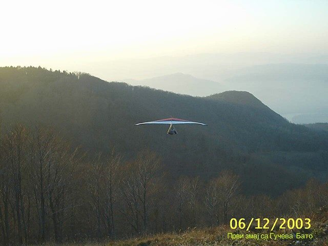 Српски (ћирилица): Безмоторно-змајарство Гучево